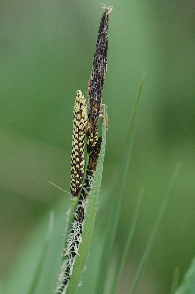 Picture taken in Commanster, Belgian High Ardennes . Species: Carex nigra